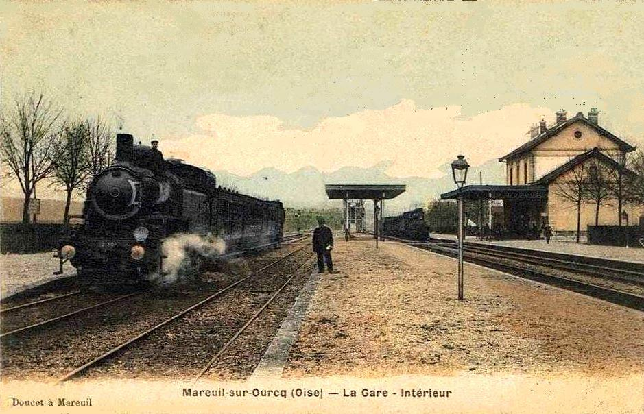 Train de voyageurs à destination d'Ormoy-Villers.